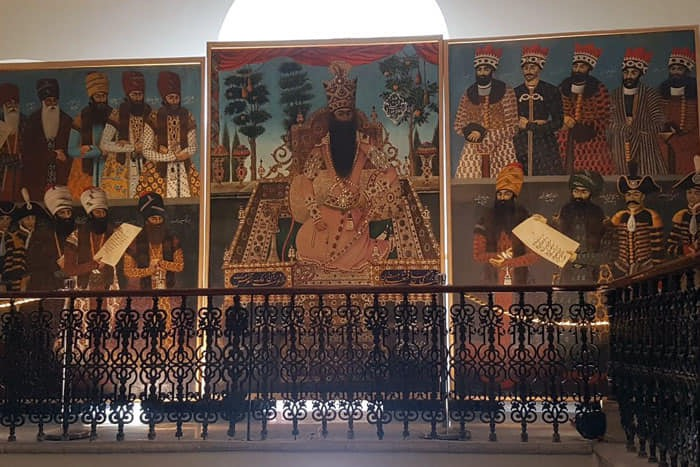 صورة جدارية للملك القاجاري و وزرائه